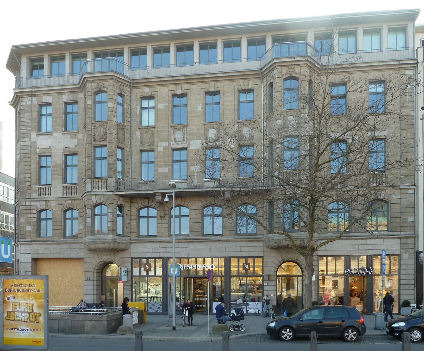 Das Baudenkmal, Wohn- und Geschäftshaus in der Georgstraße 44 in Hannover ist auch als Haus Friedrich Wilhelm bekannt ...